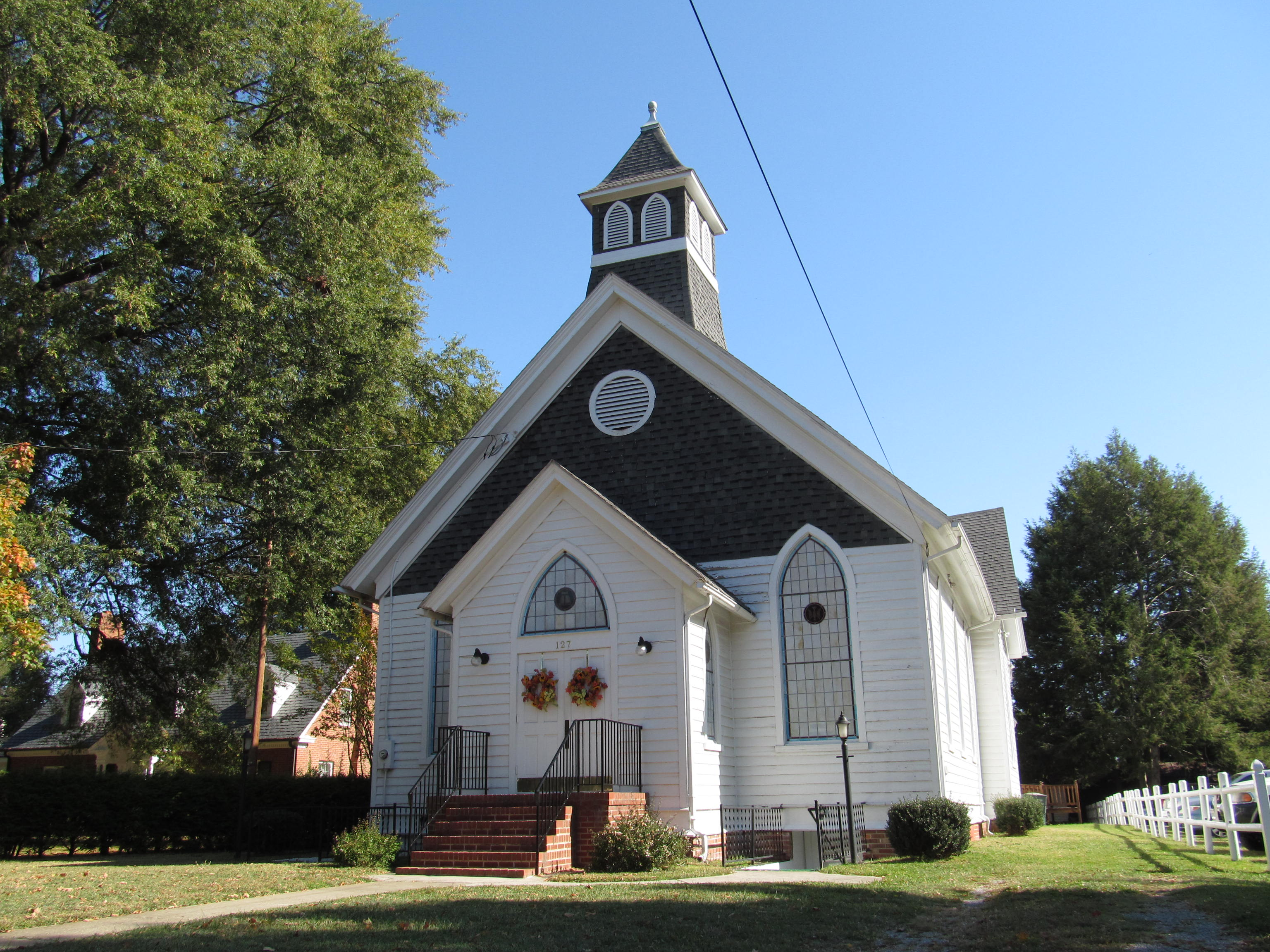 Bowling Green, Virginia